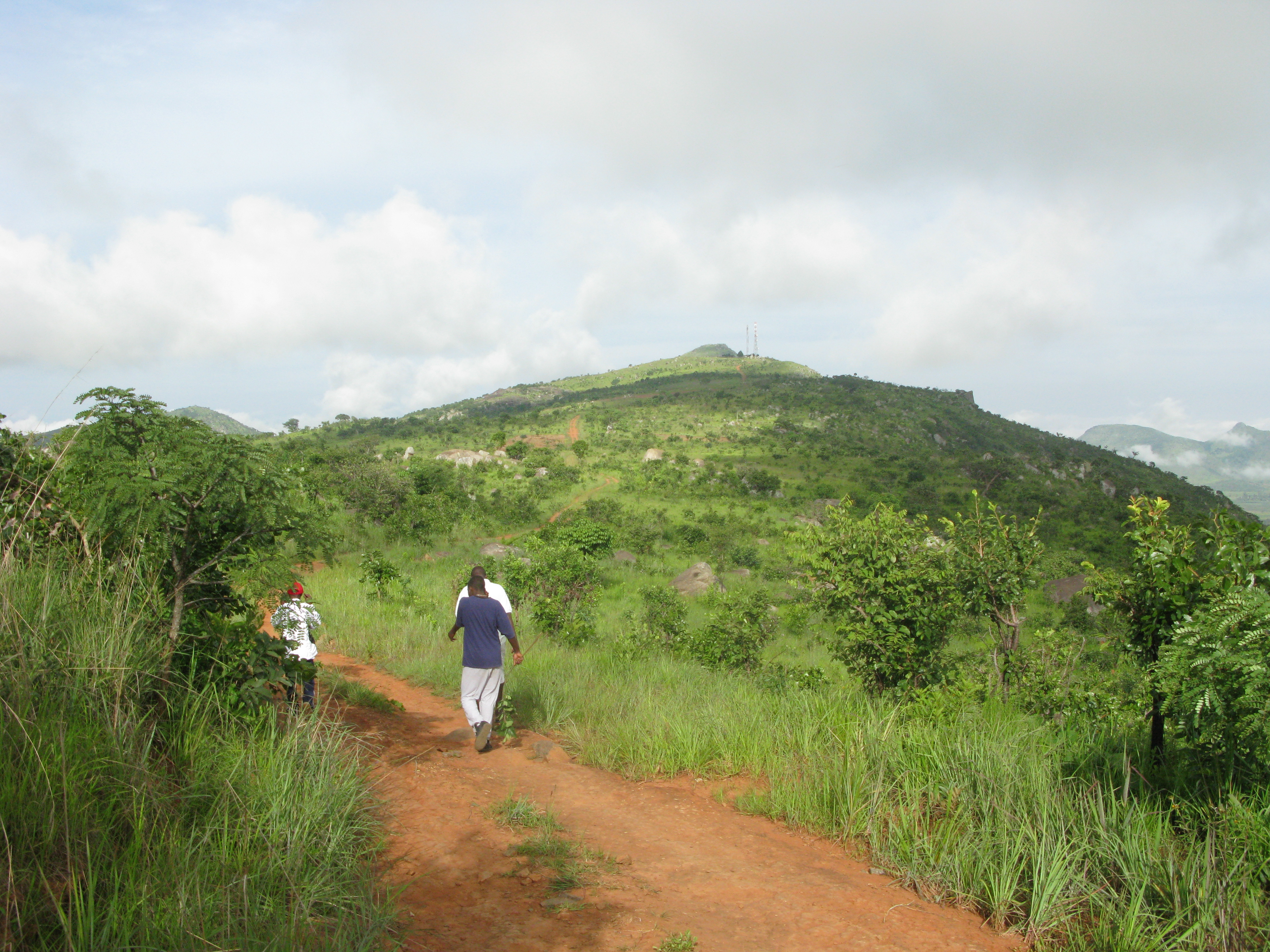 Waku Kungu